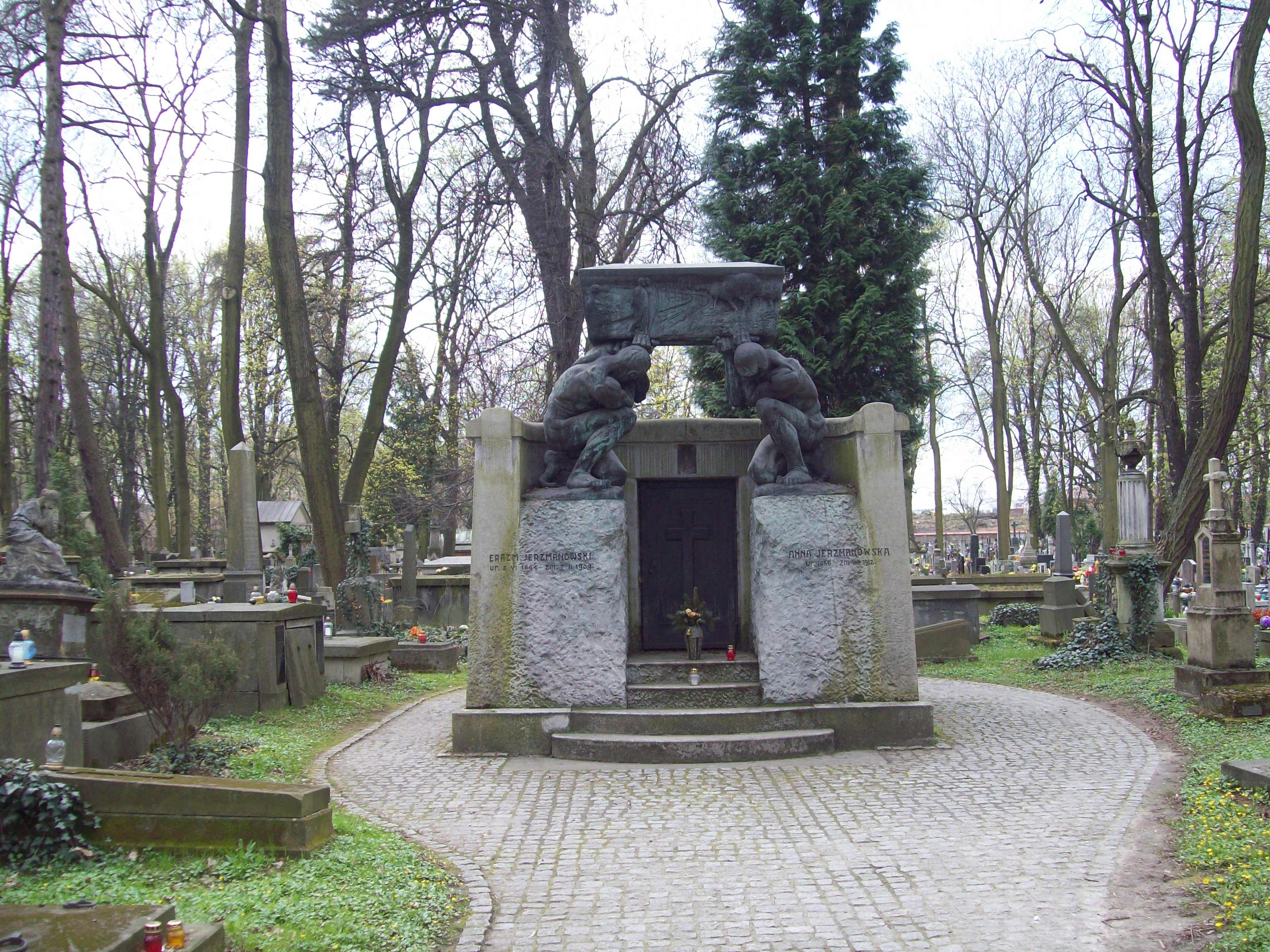 Grobowiec E. A. Jerzmanowskich w Krakowie